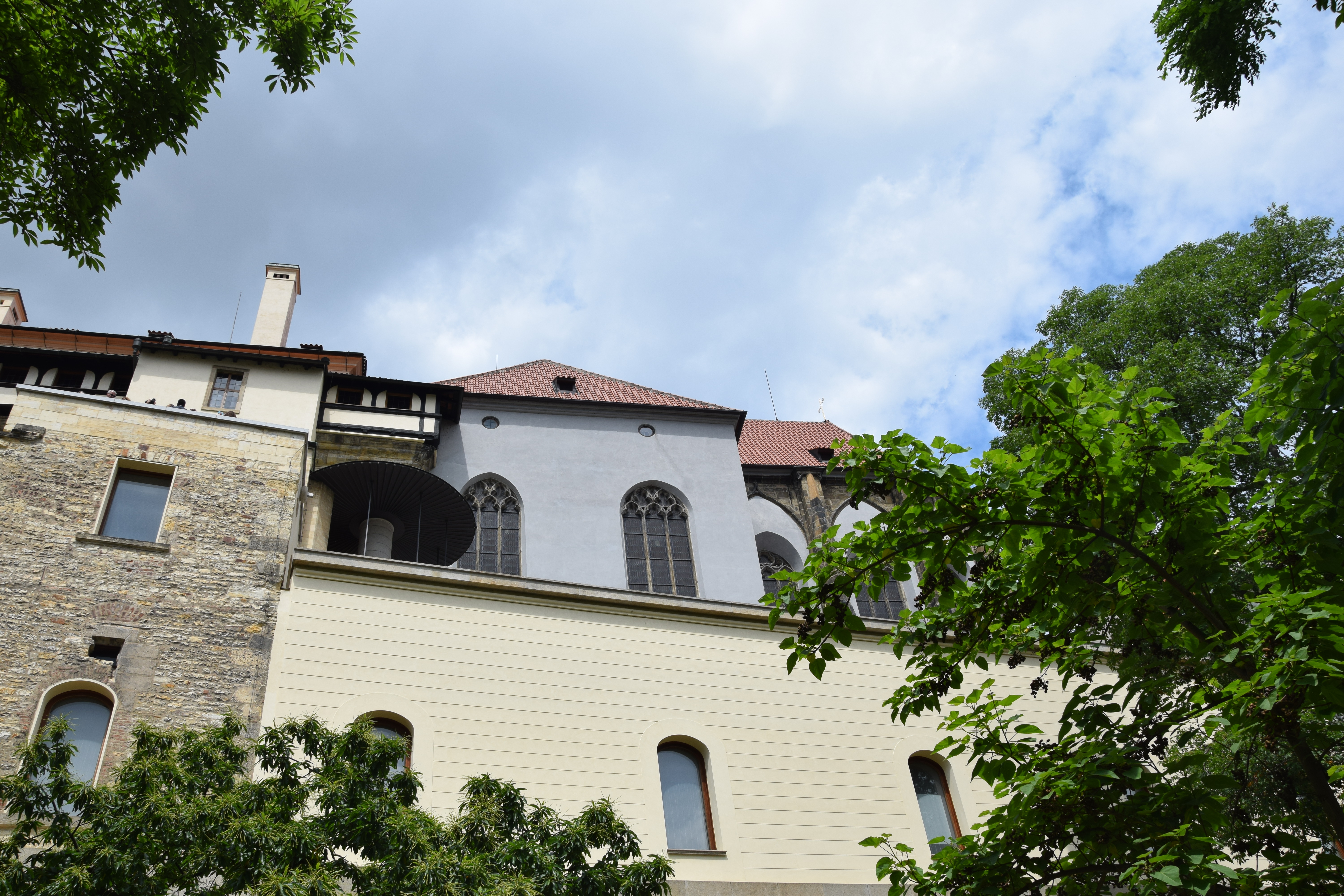 kkk